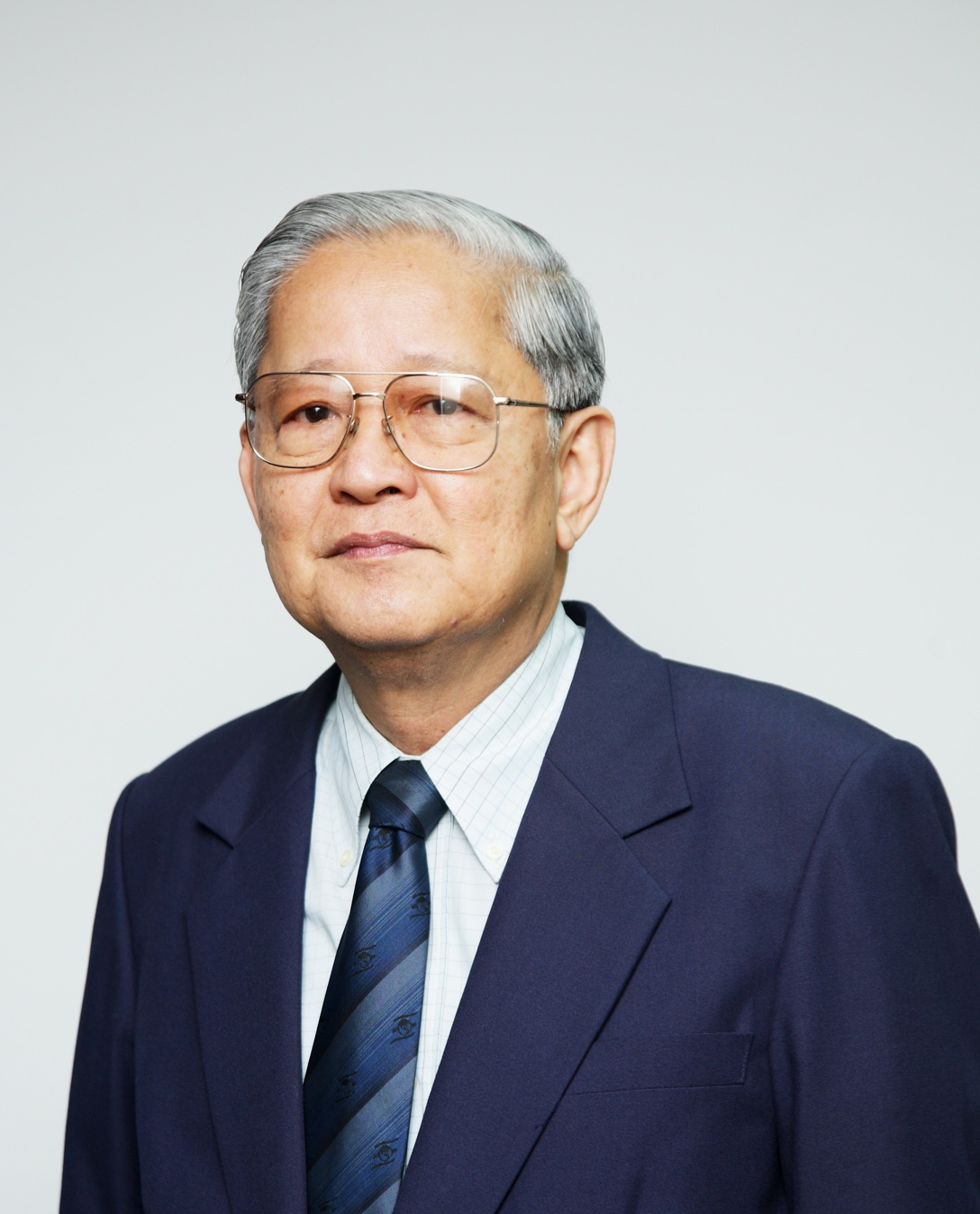 ศาสตราจารย์ ดร.วิชัย บุญแสง